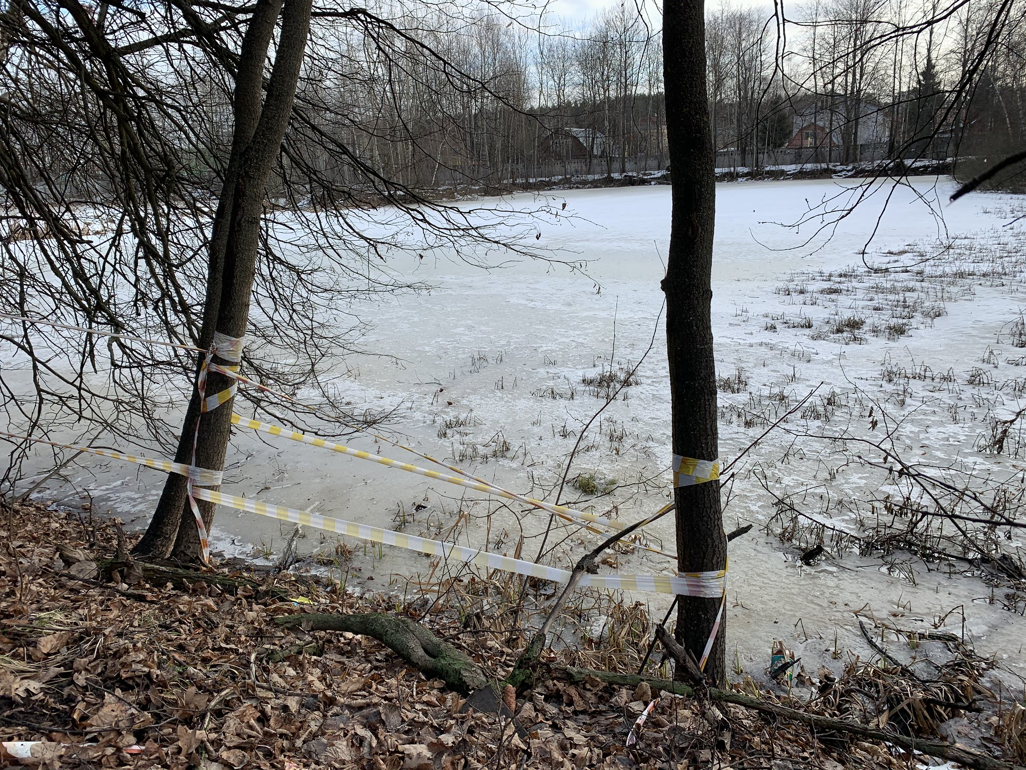 Опалиха-Алексеевское - пруд 2020